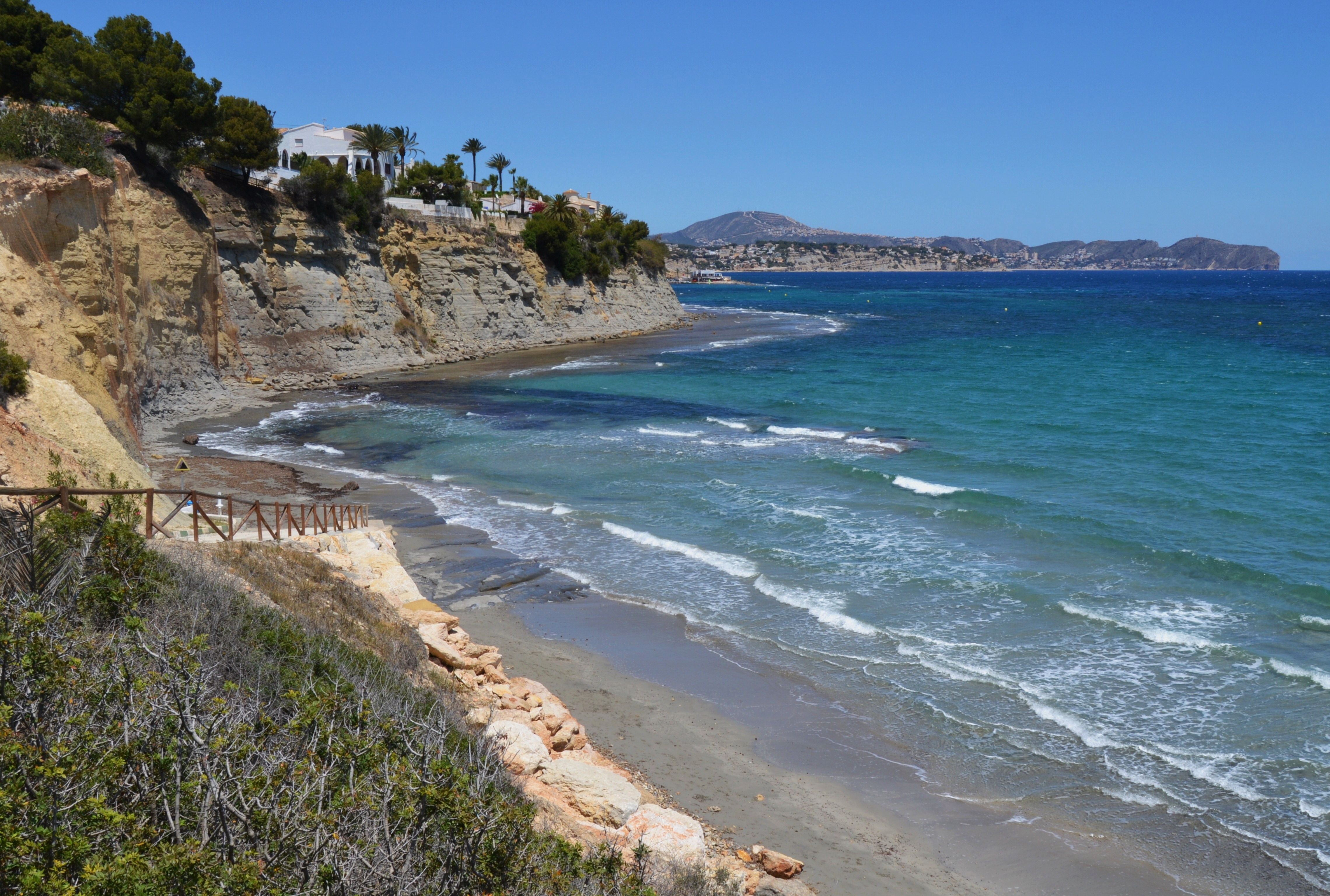 Cala o platja de la Calalga de Calp. This is a a photo of a beach in the Land of Valencia, Spain, with id: PL-1289